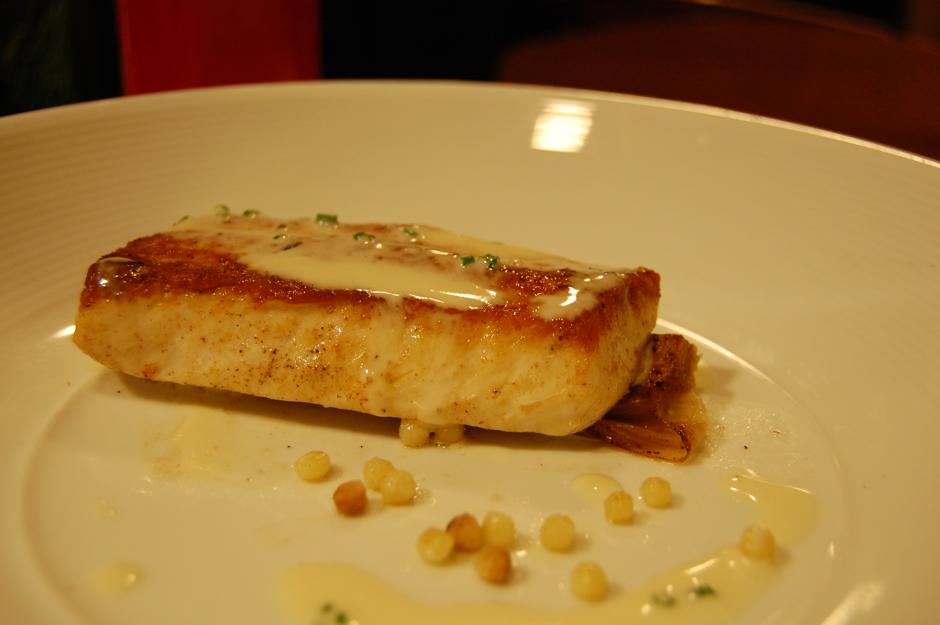 caviar beurre fondue leek fregola